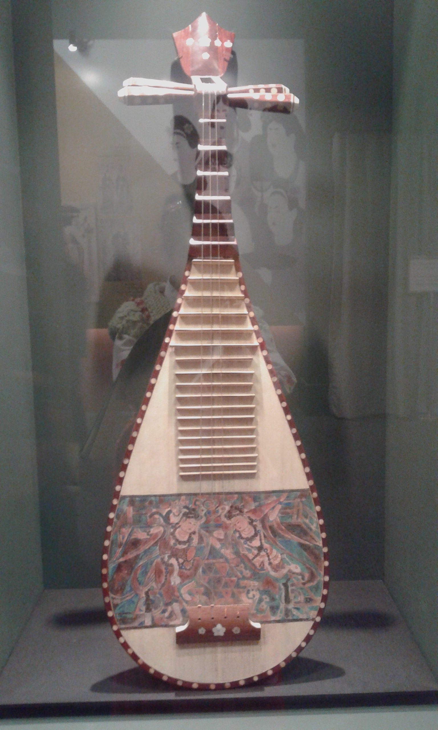 中文（香港）: 螺鈿直頸琵琶